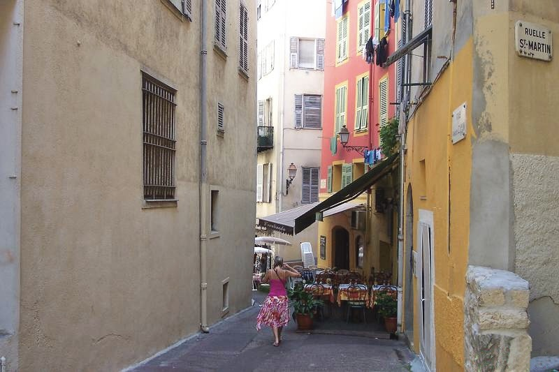 Rue Zanin (Nice)